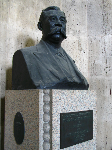 Photograph for Dr.Juntaro.takahashi.